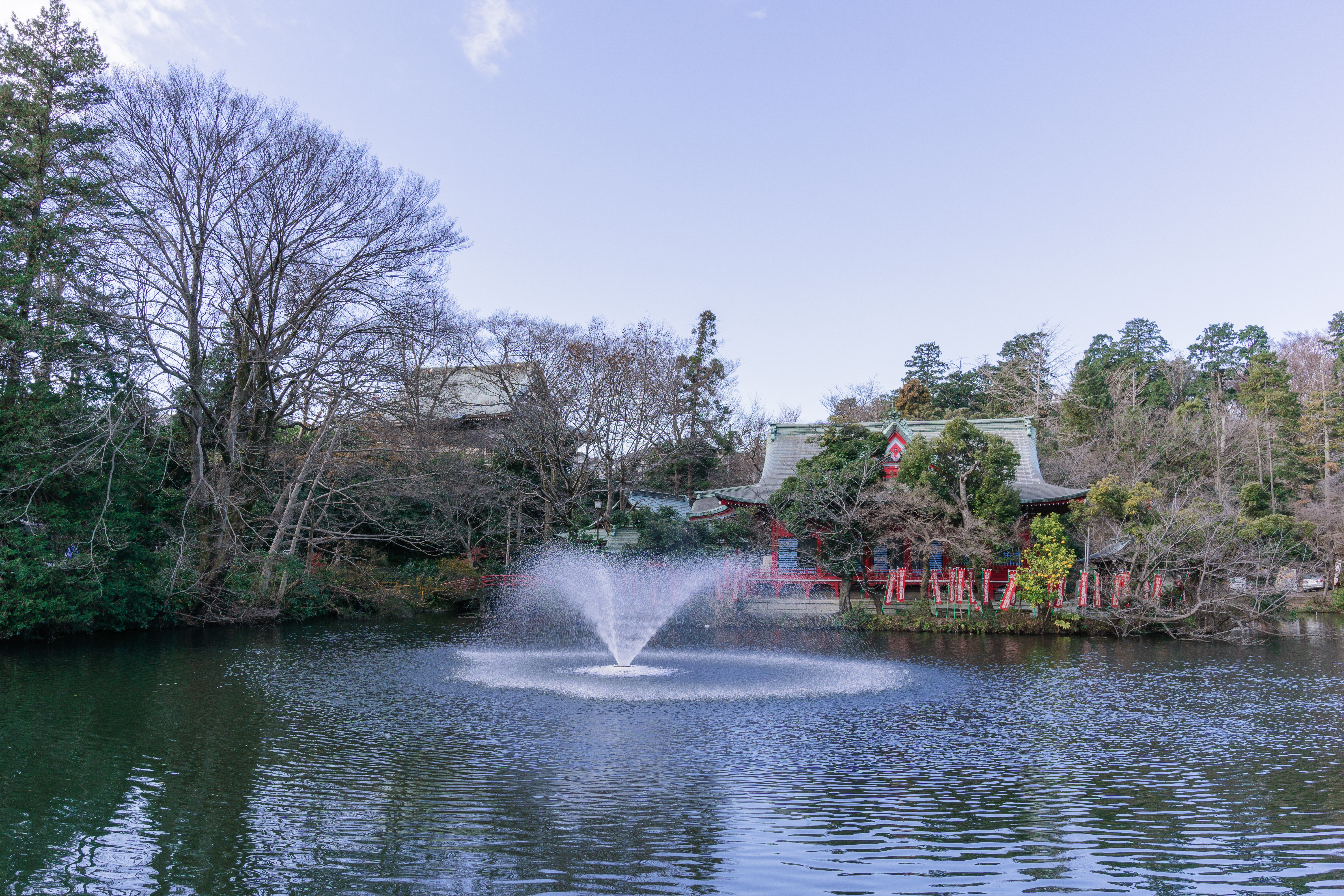 井の頭恩賜公園 / Inokashira Park